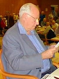 Yair Kraidman, 8. Weltmeisterschaft der Senioren 1998 in Grieskirchen / Österreich.